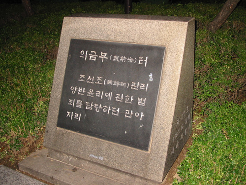 의금부 터. 서울 종각역 근처. 2002년 9월 29일.